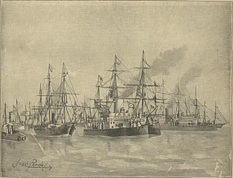 A Esquadra Insurrecta (Desenho pelo Sr. José Pardal).